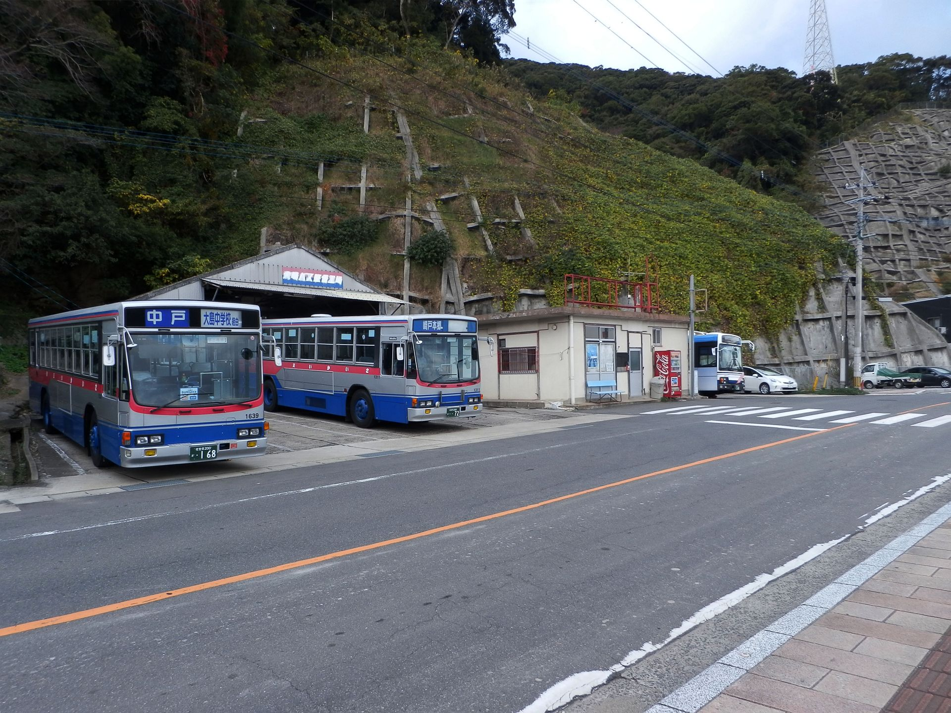 さいかい交通大島営業所